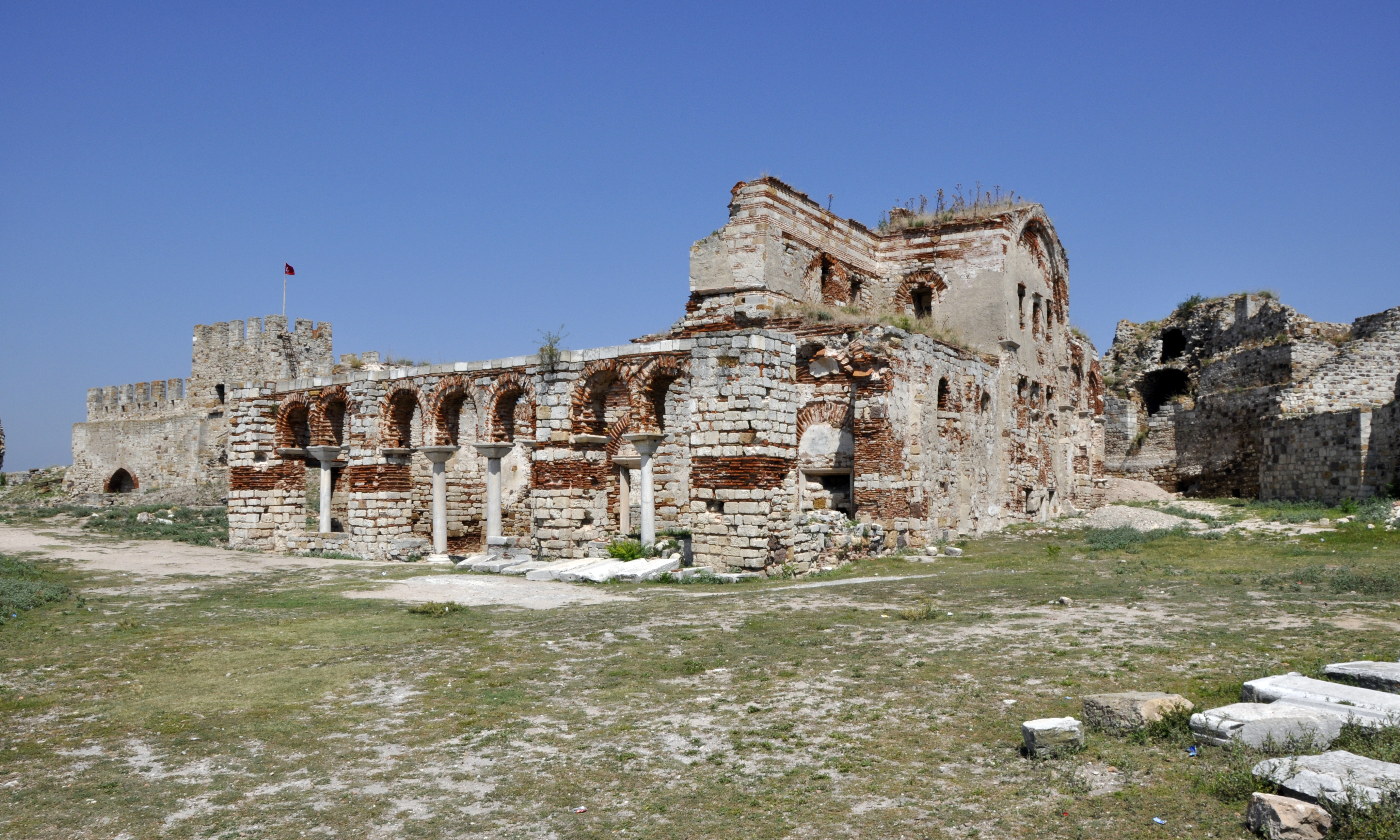 Enez Kalesi